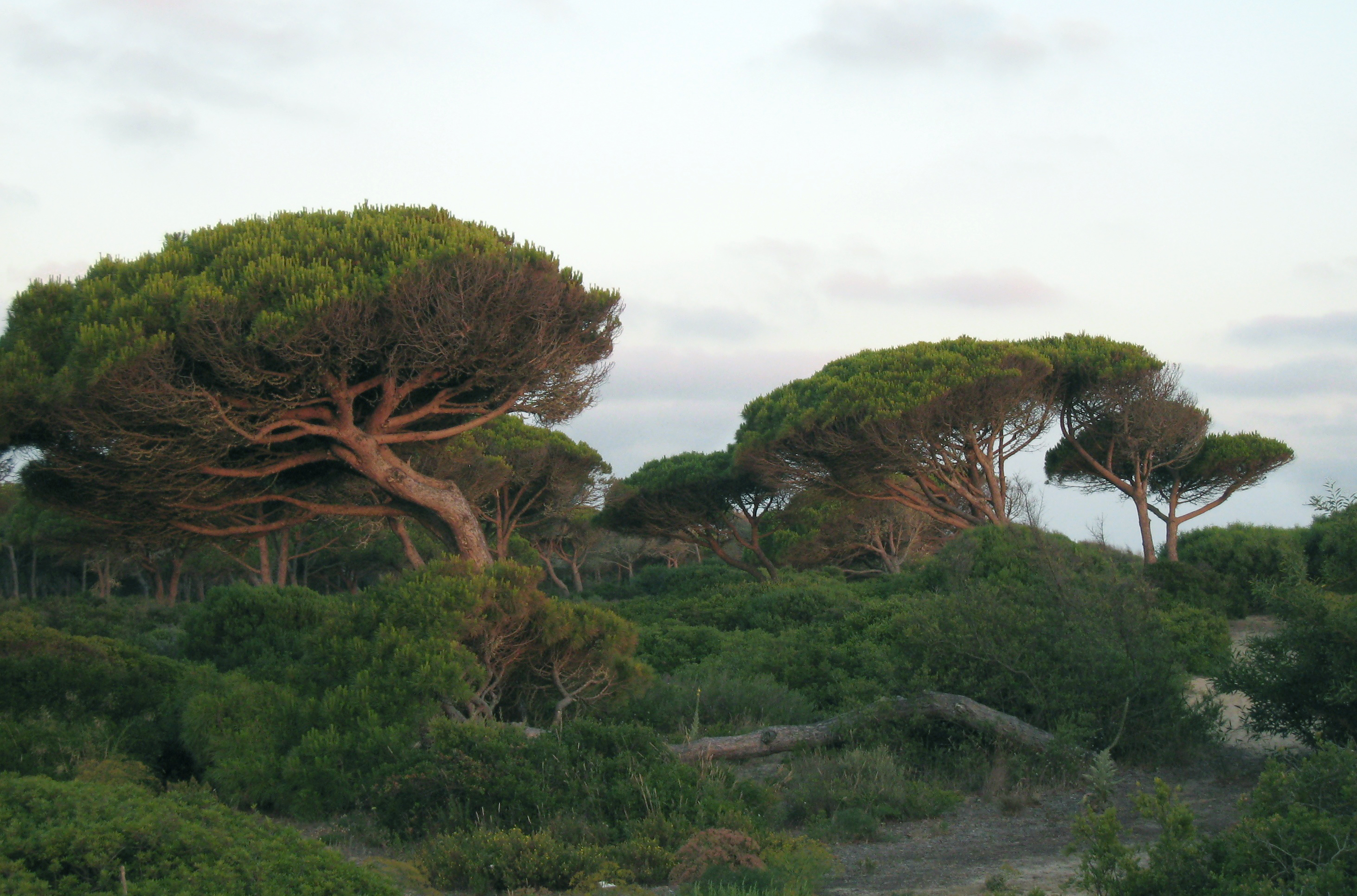 Pinus pinea, Costa Sancti Petri, Andalucía, Spain